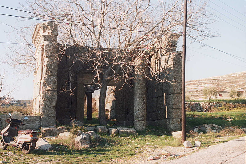 foto del castillo